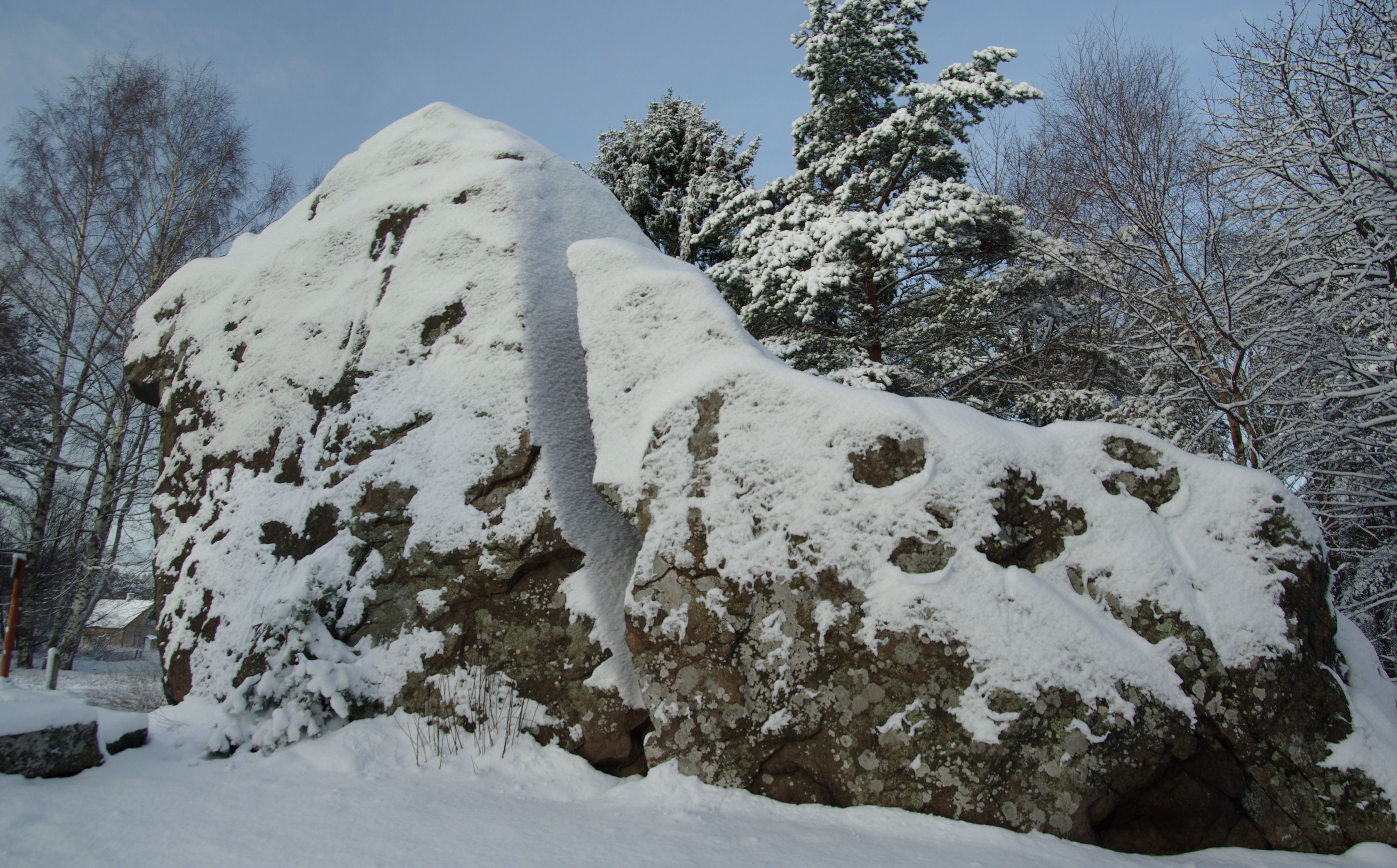 Jaani-Tooma suurkivi on Eestis suuruselt 20., rabakivist hiidrahn Harju maakonnas Kuusalu vallas Kasispea külas